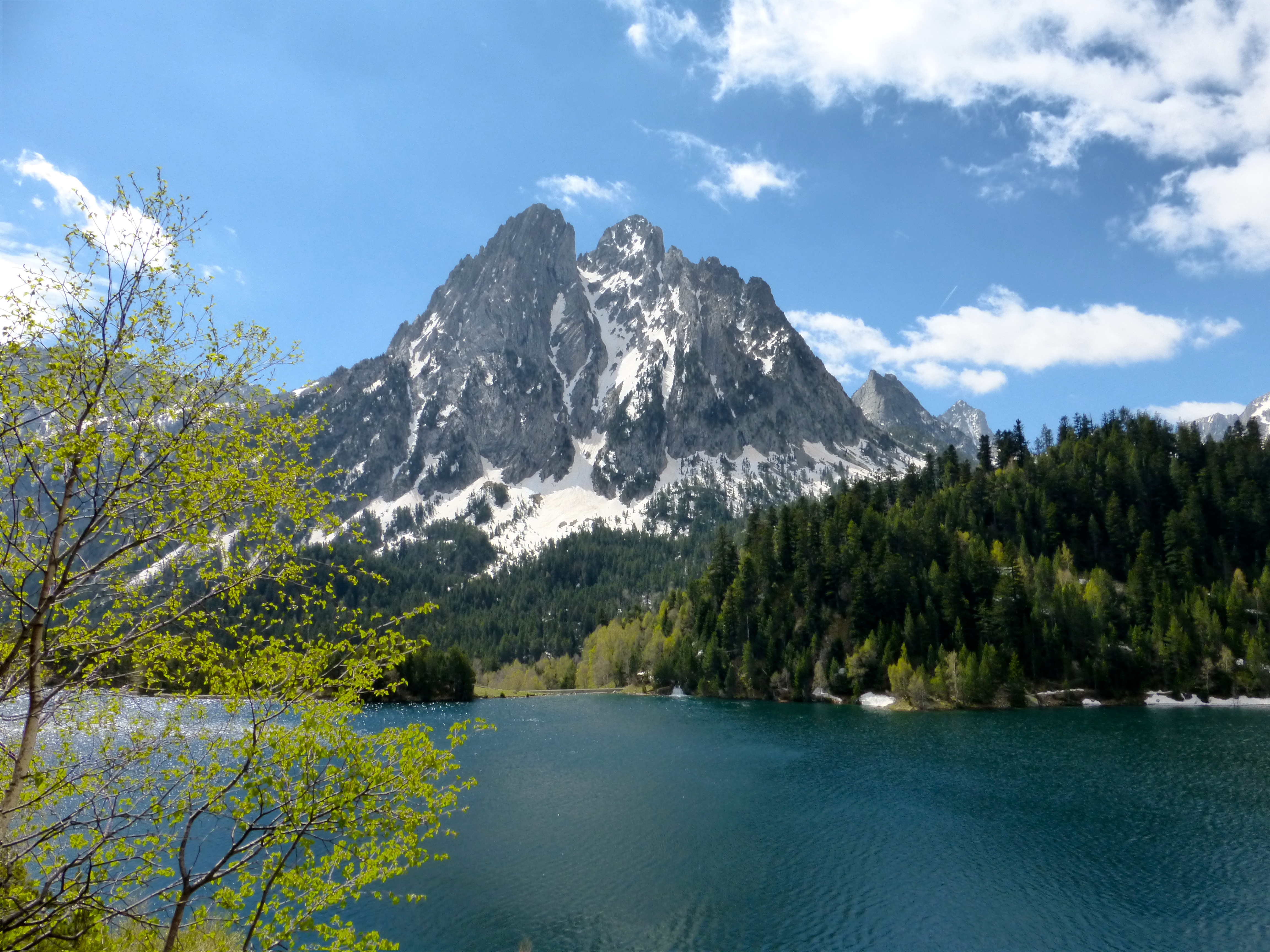 En el Parque Nacional de Aigüestortes This is a a photo of a natural area in Catalonia, Spain, with id: ES510081